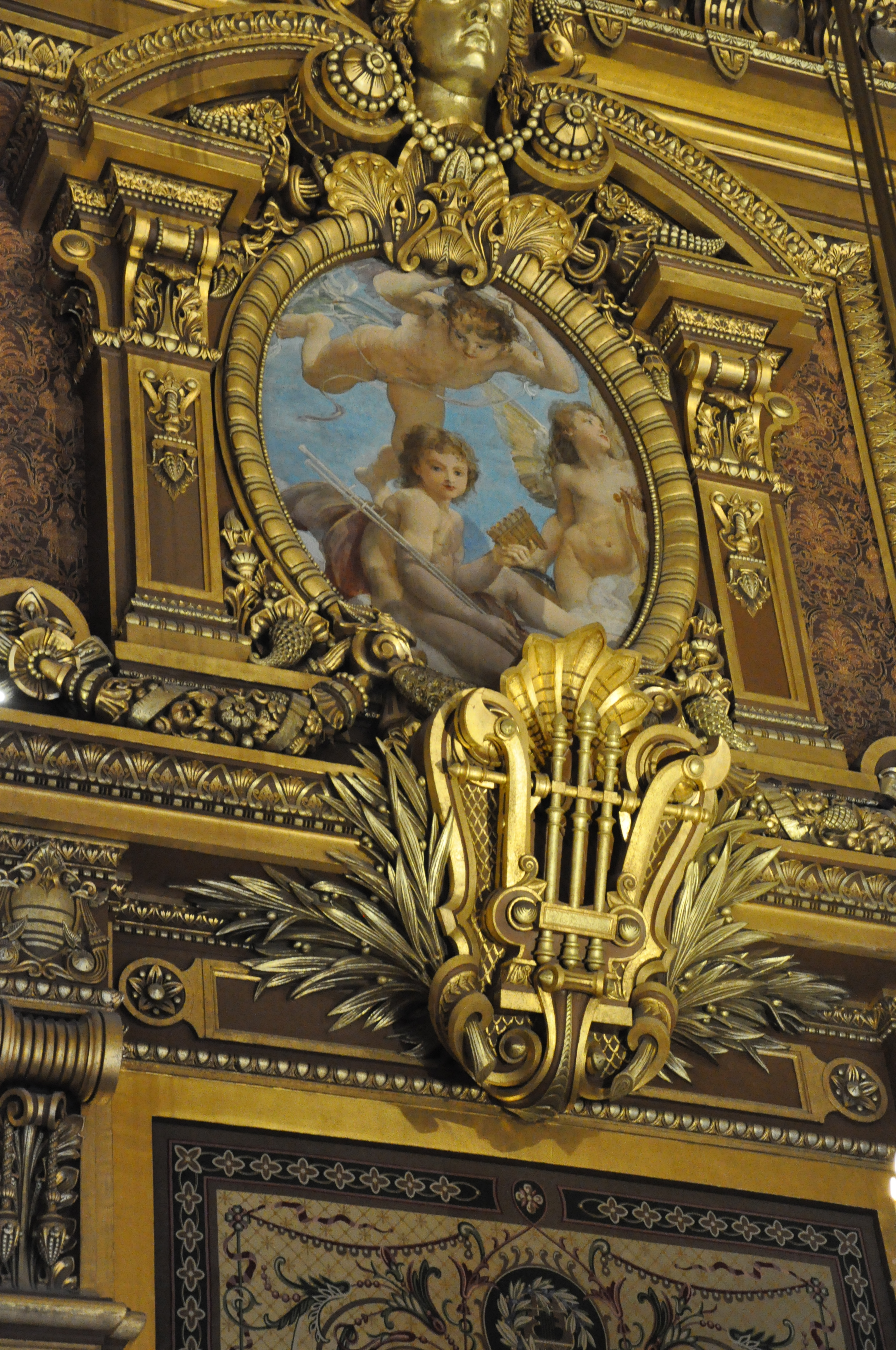 Lyre dans le foyer principal de l'Opéra Garnier (Paris, France).